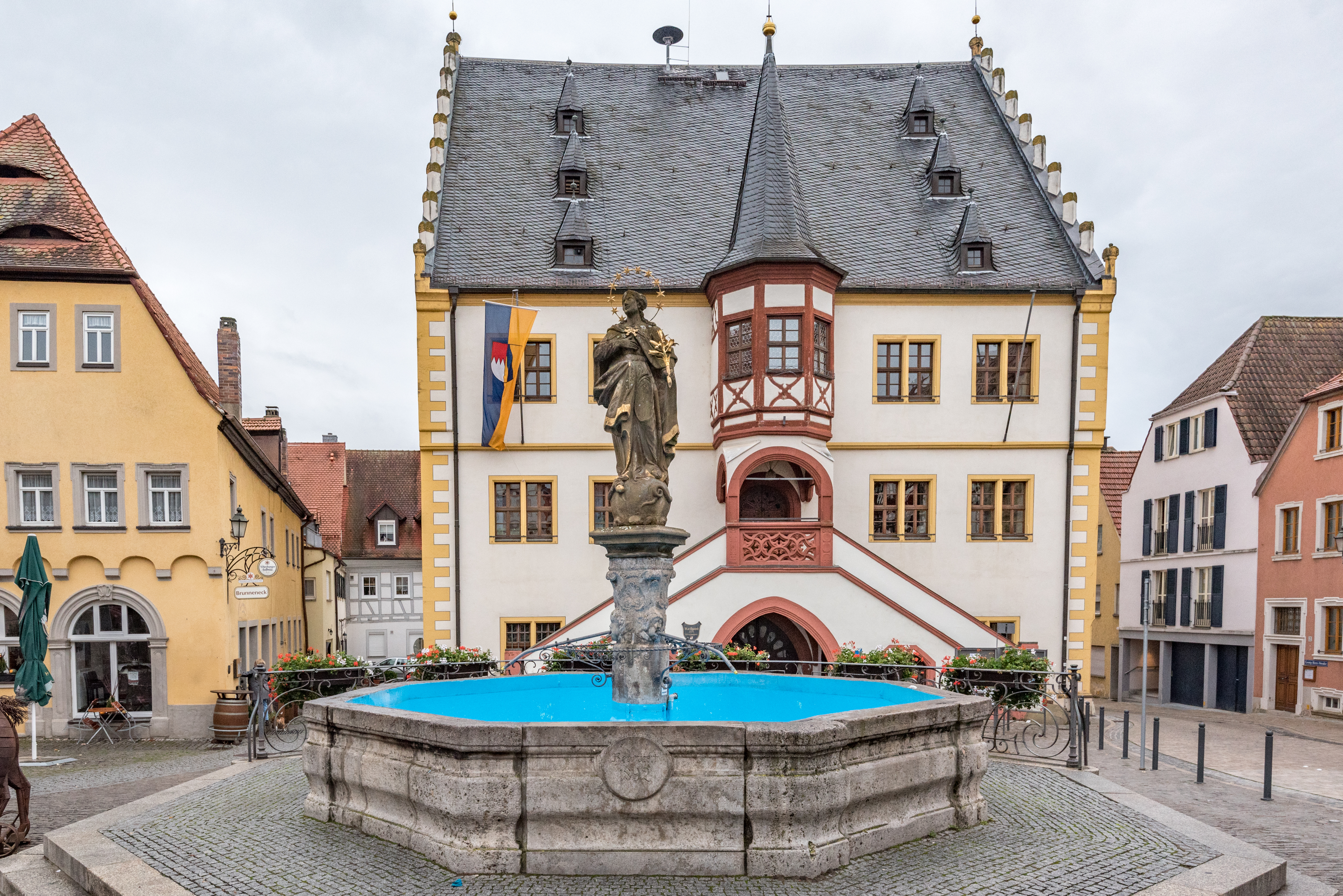 Volkach, Marktplatz 1